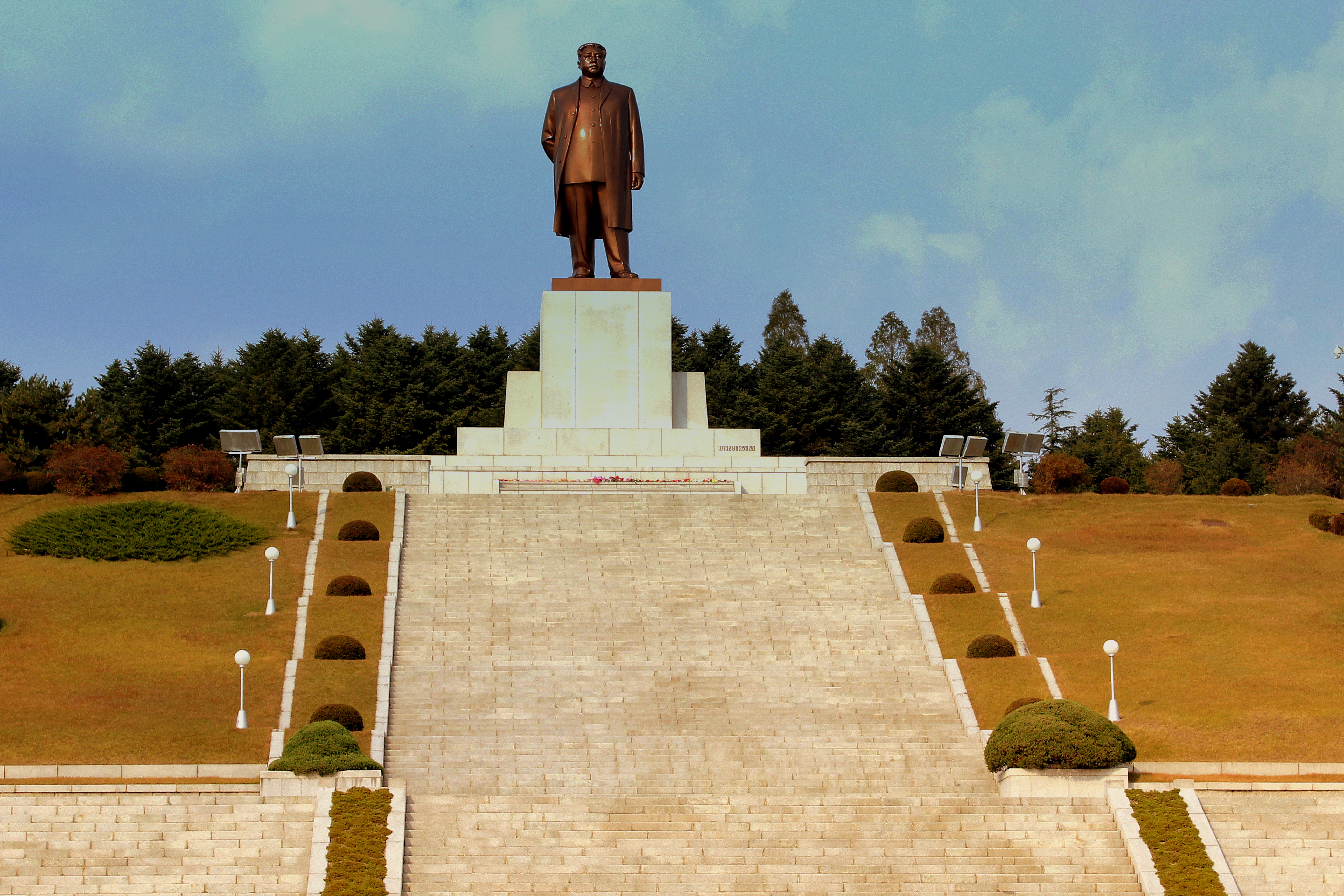 STATUE OF KIM IL SUNG KAESONG CITY DPRK NORTH KOREA OCT 2012